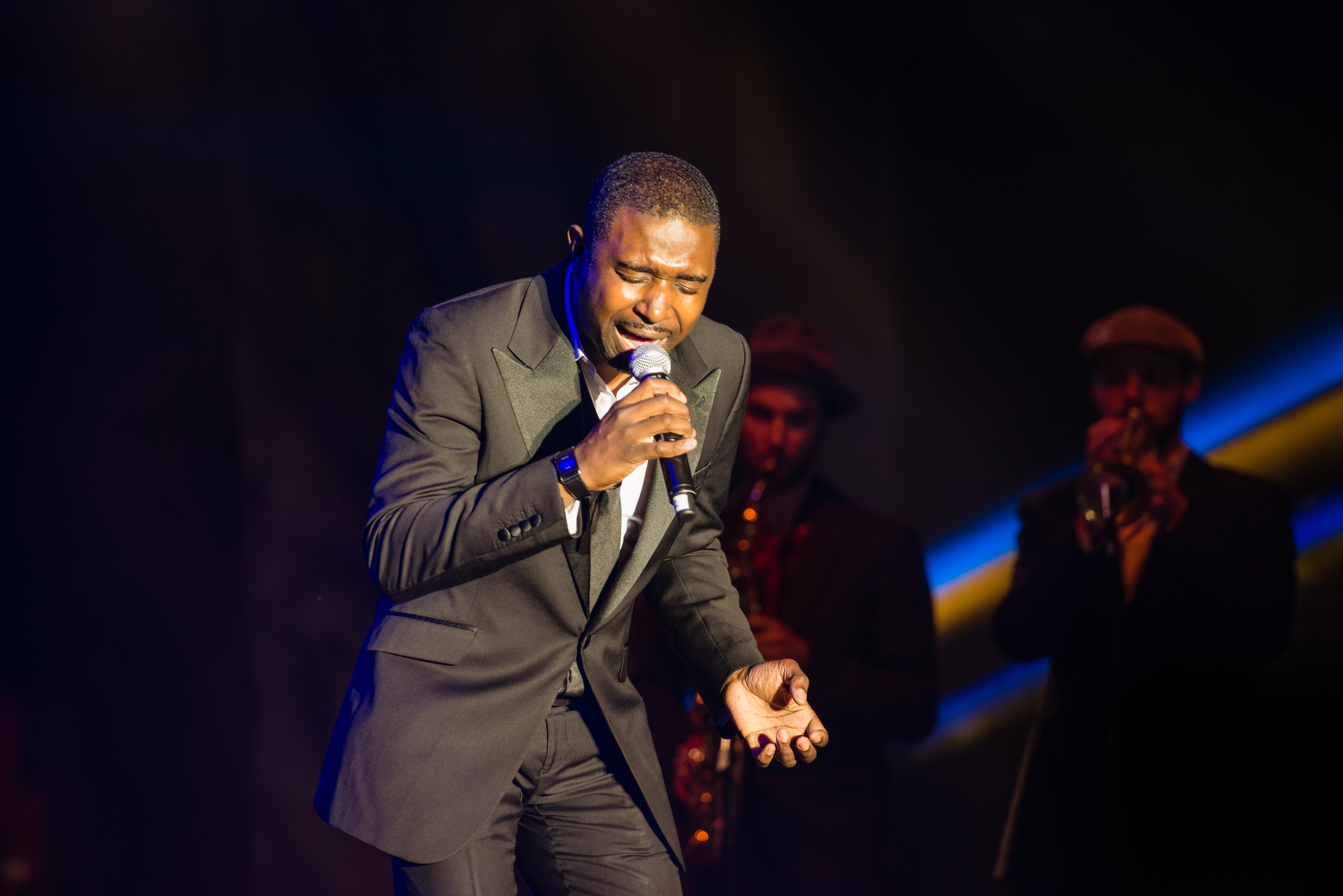 'Ruhr Reggae Summer 2014 - Dortmund': 'Bitty McLean'